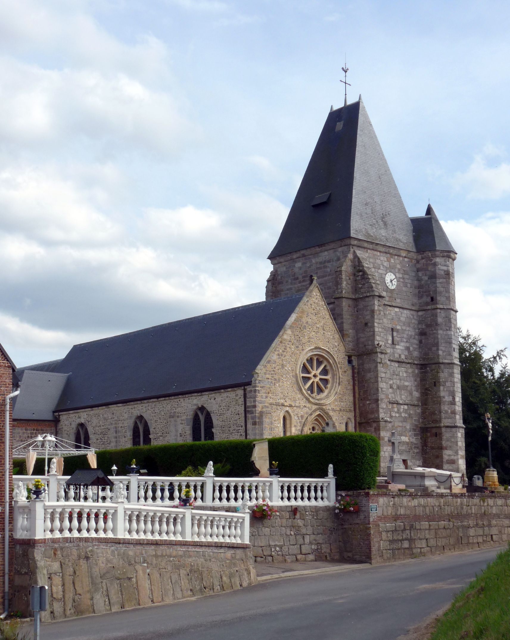 Église Saint-Martin de Drosay (Inscrit) .